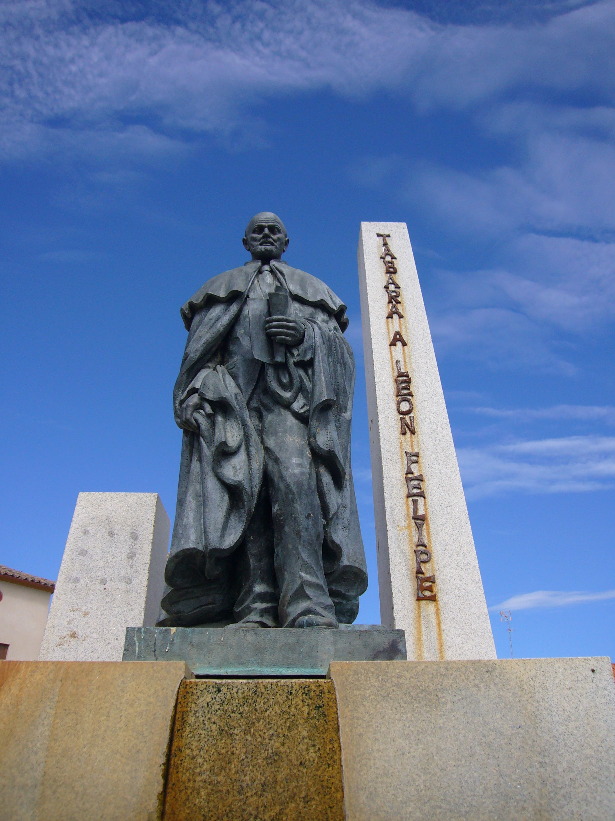 Monumento al poeta zamorano León Felipe en Tábara, su pueblo natal.